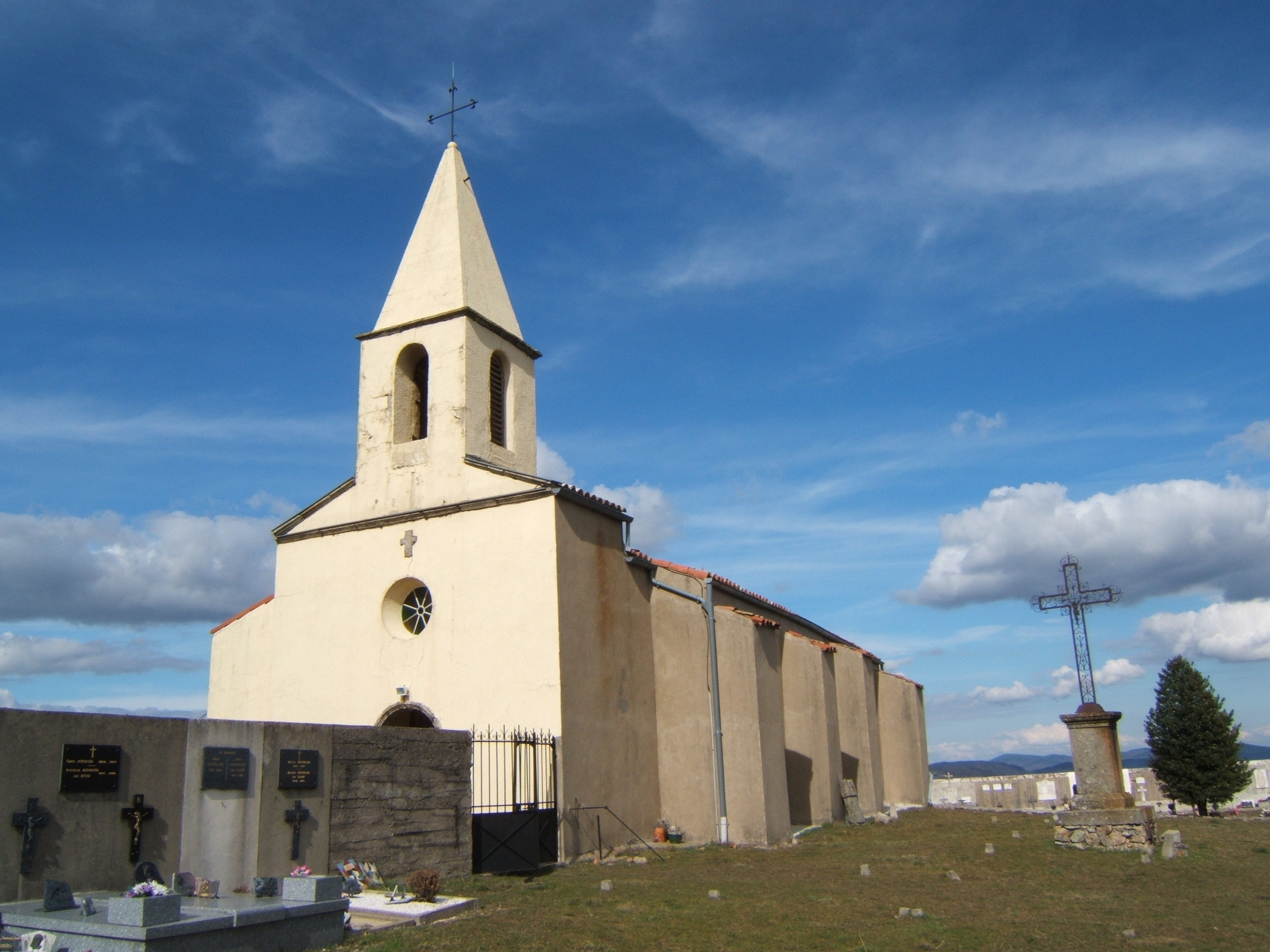 église Saint Etienne